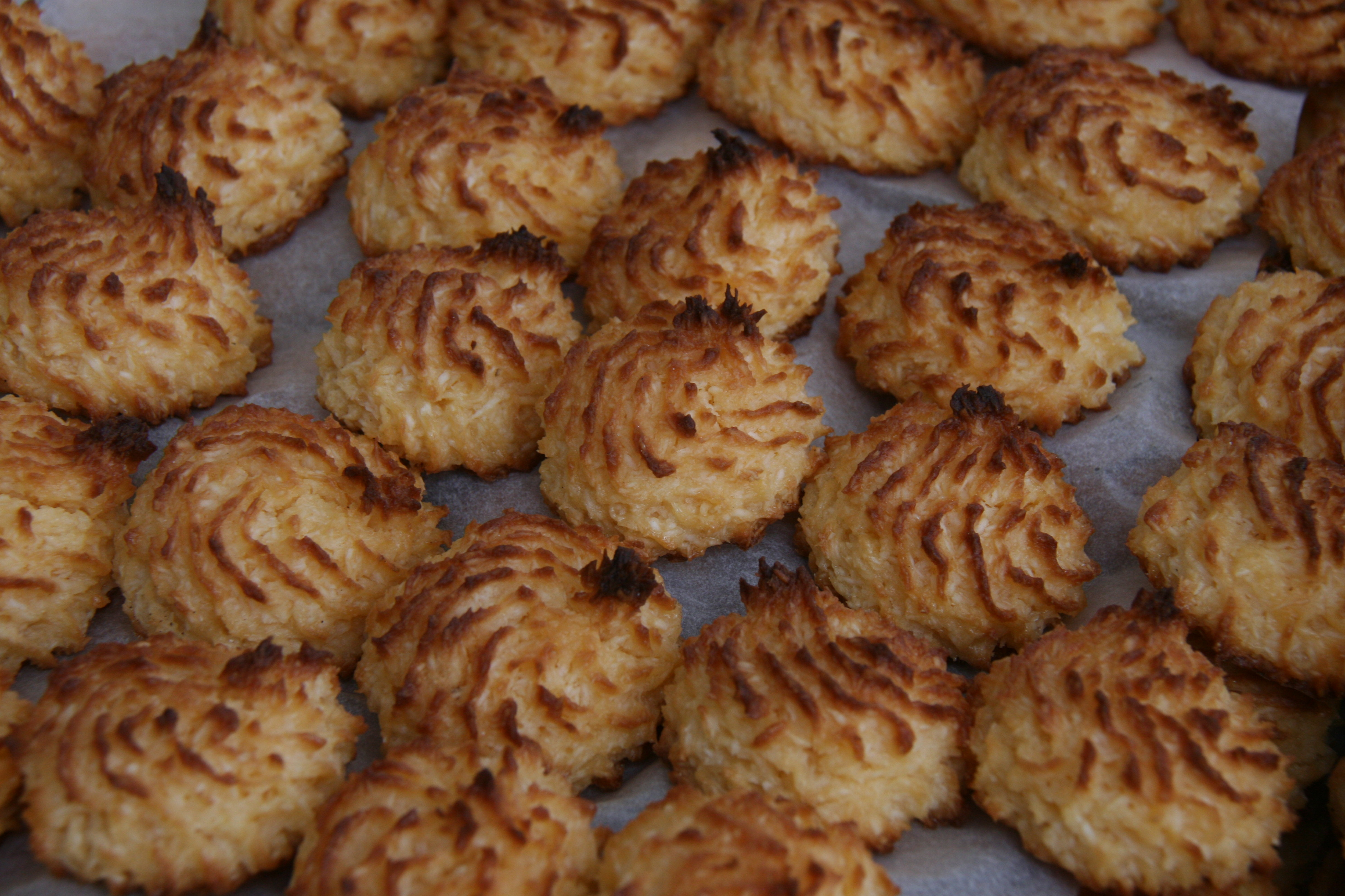 Cocadas